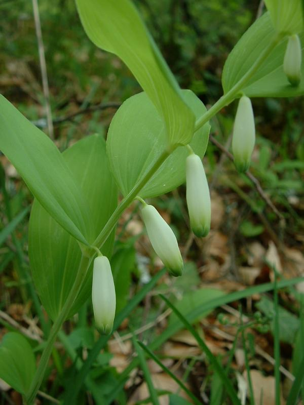 Sceau de Salomon odorant, photo J.F. Gaffard, Auberive, mai 2004